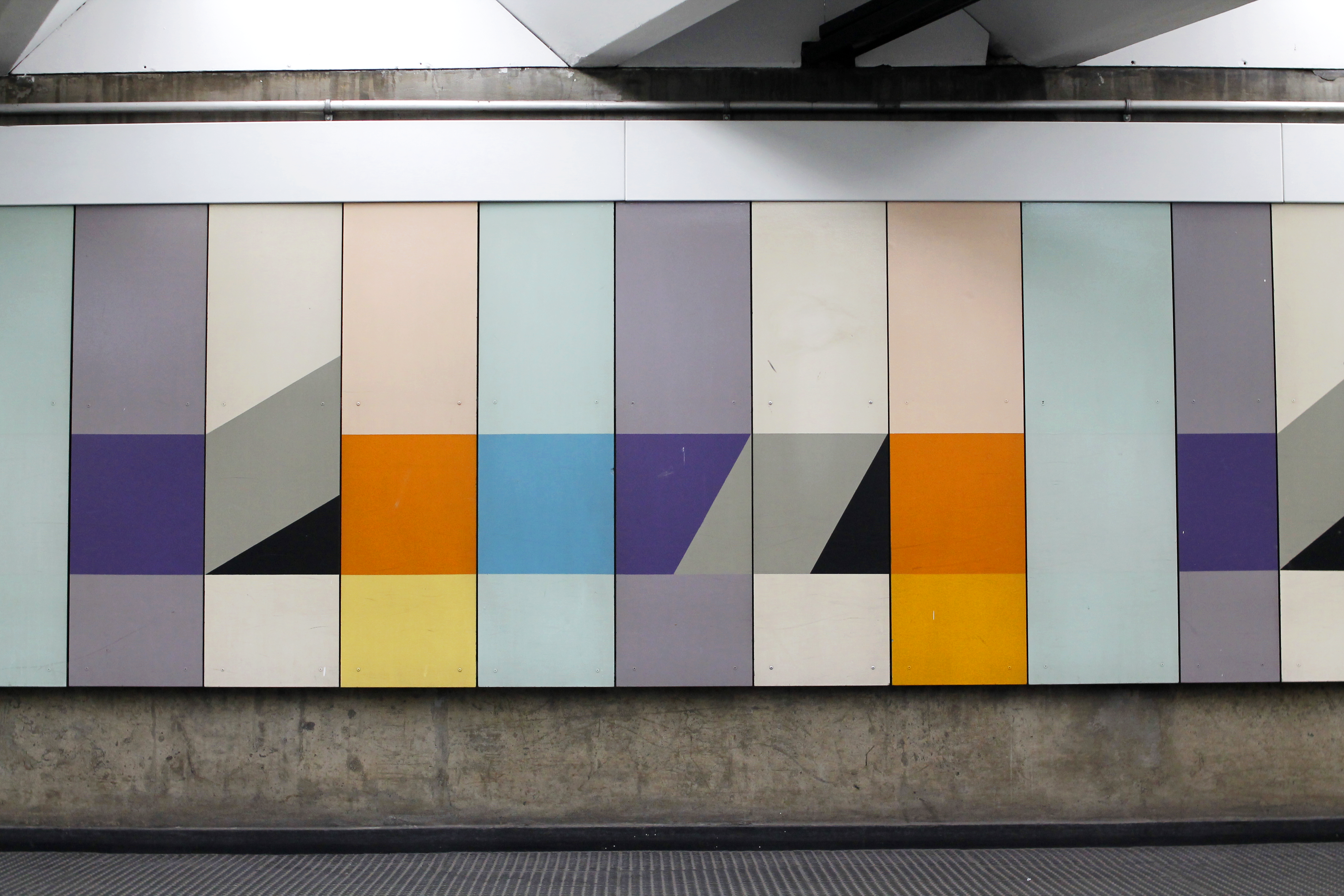 Monumento "Sem Título" do artista Maurício Nogueira Lima, localizado na estação de Metrô Santana, na cidade de São Paulo.